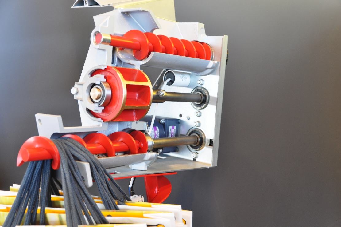 Fruehjahrsmessen Stuttgart -HAUS-HOLZ-ENERGIE